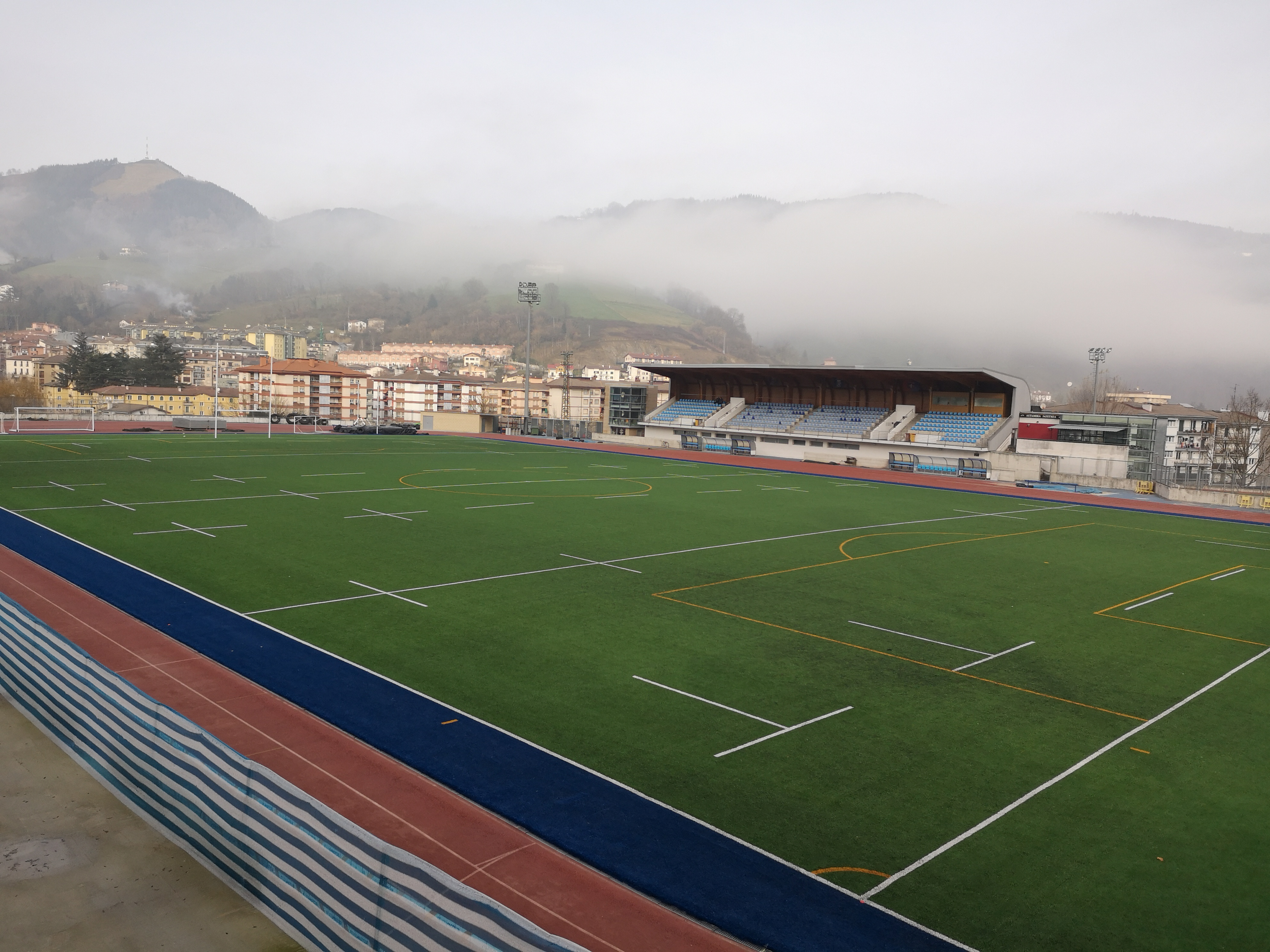 Ordiziako Altamira estadioa